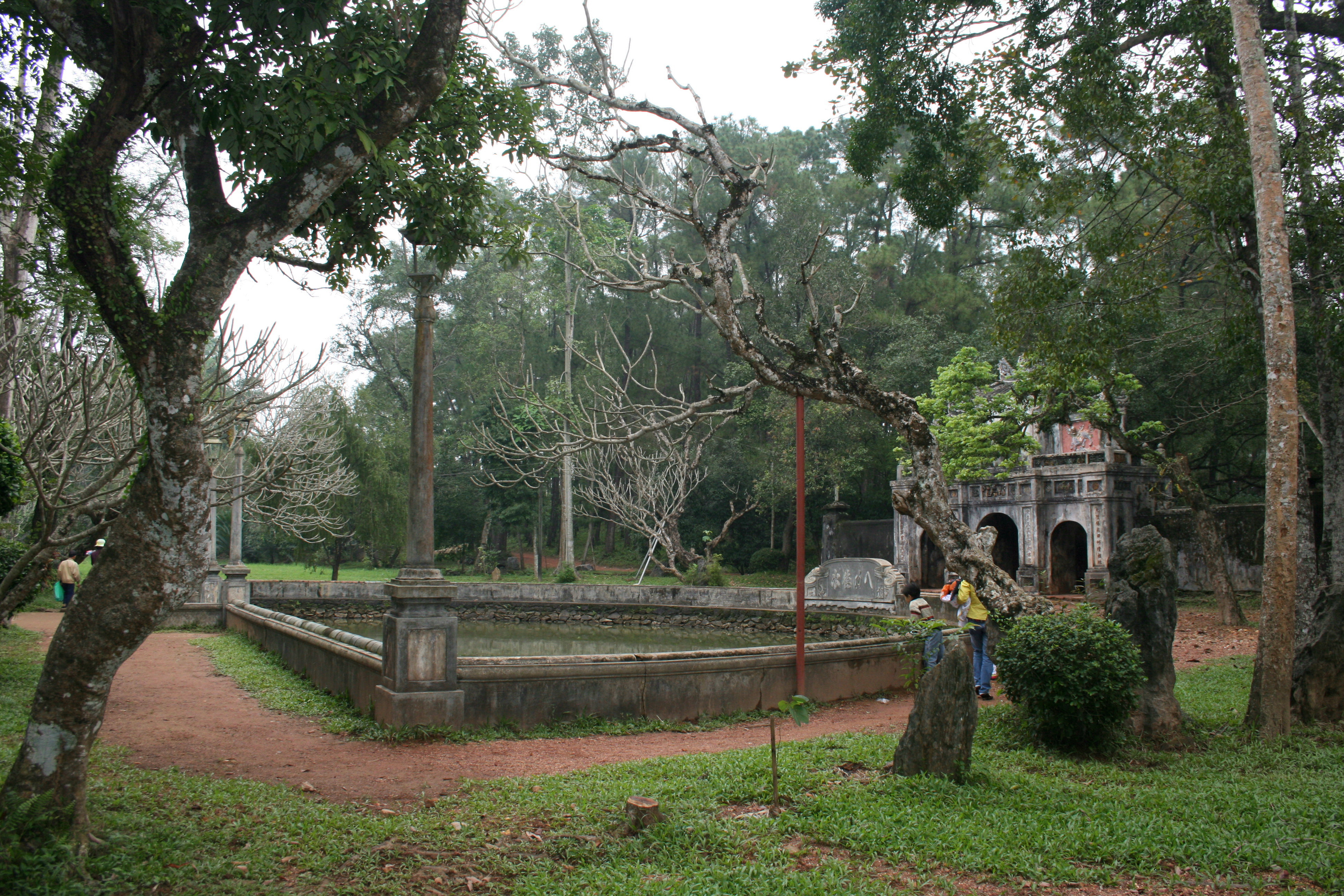 Bán Nguyệt Lake; (Tu Hieu Pagoda, Hue, Viet Nam)